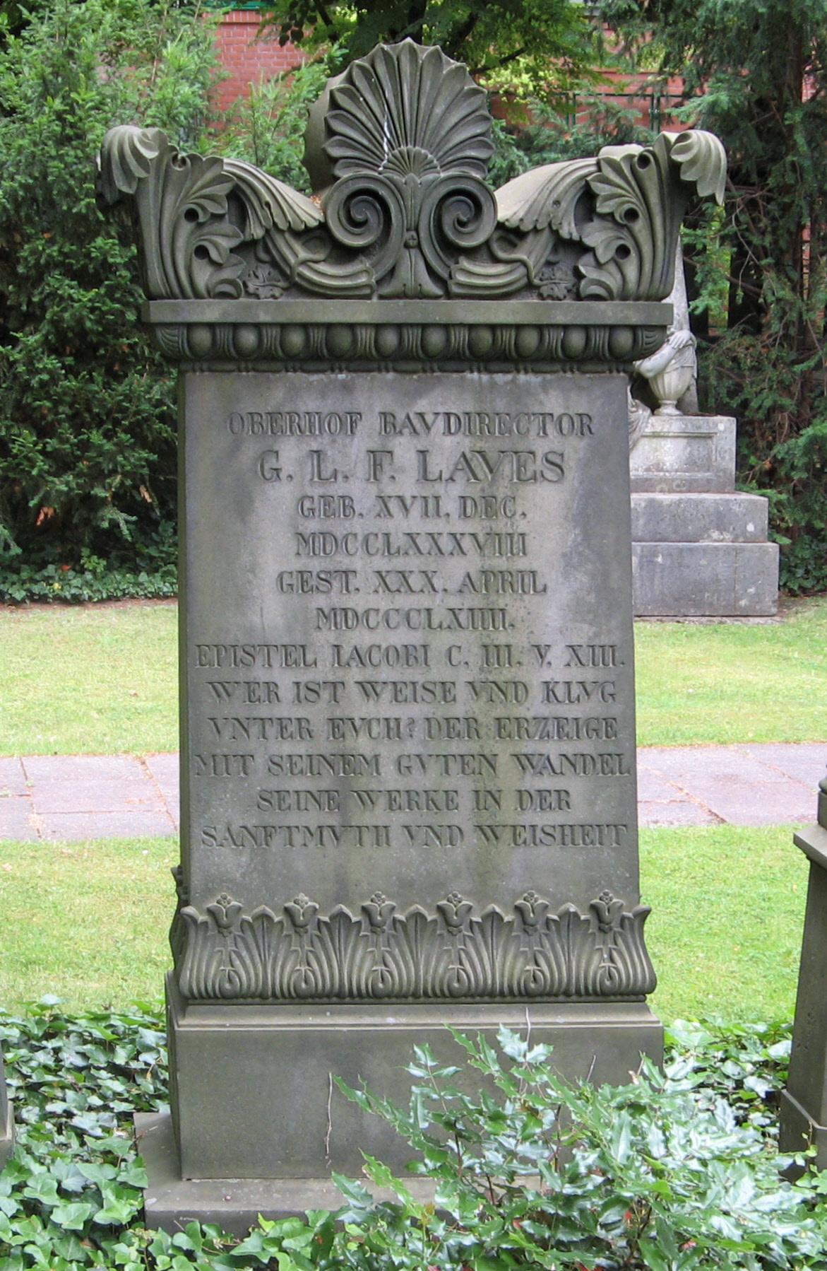 Rückseite des Grabmals Georg Ludwig Friedrich Laves auf dem Stadtfriedhof Engesohde, Hannover, Abteilung 2, Grab 5a-b